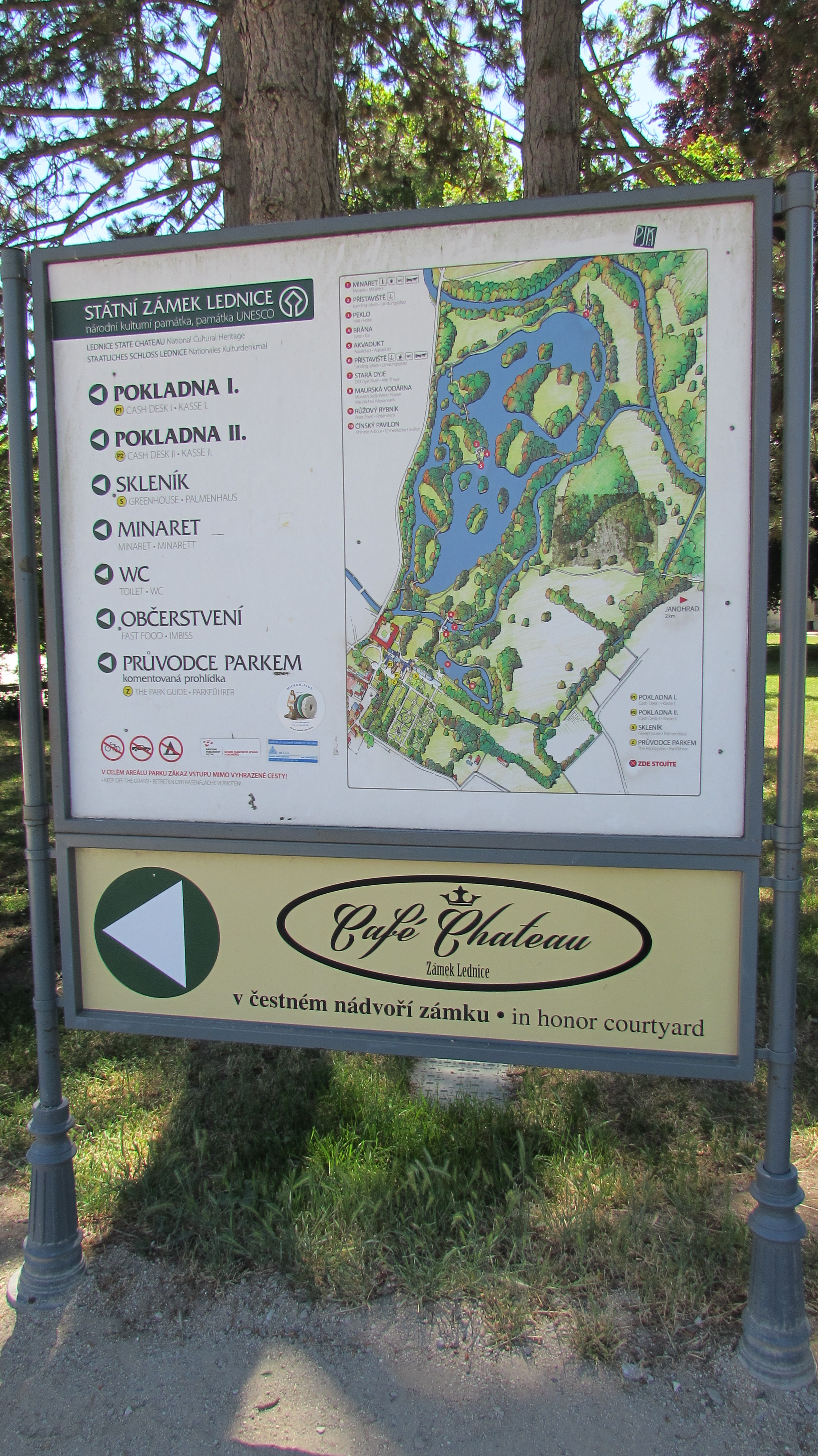 Lednice SchlossPlan